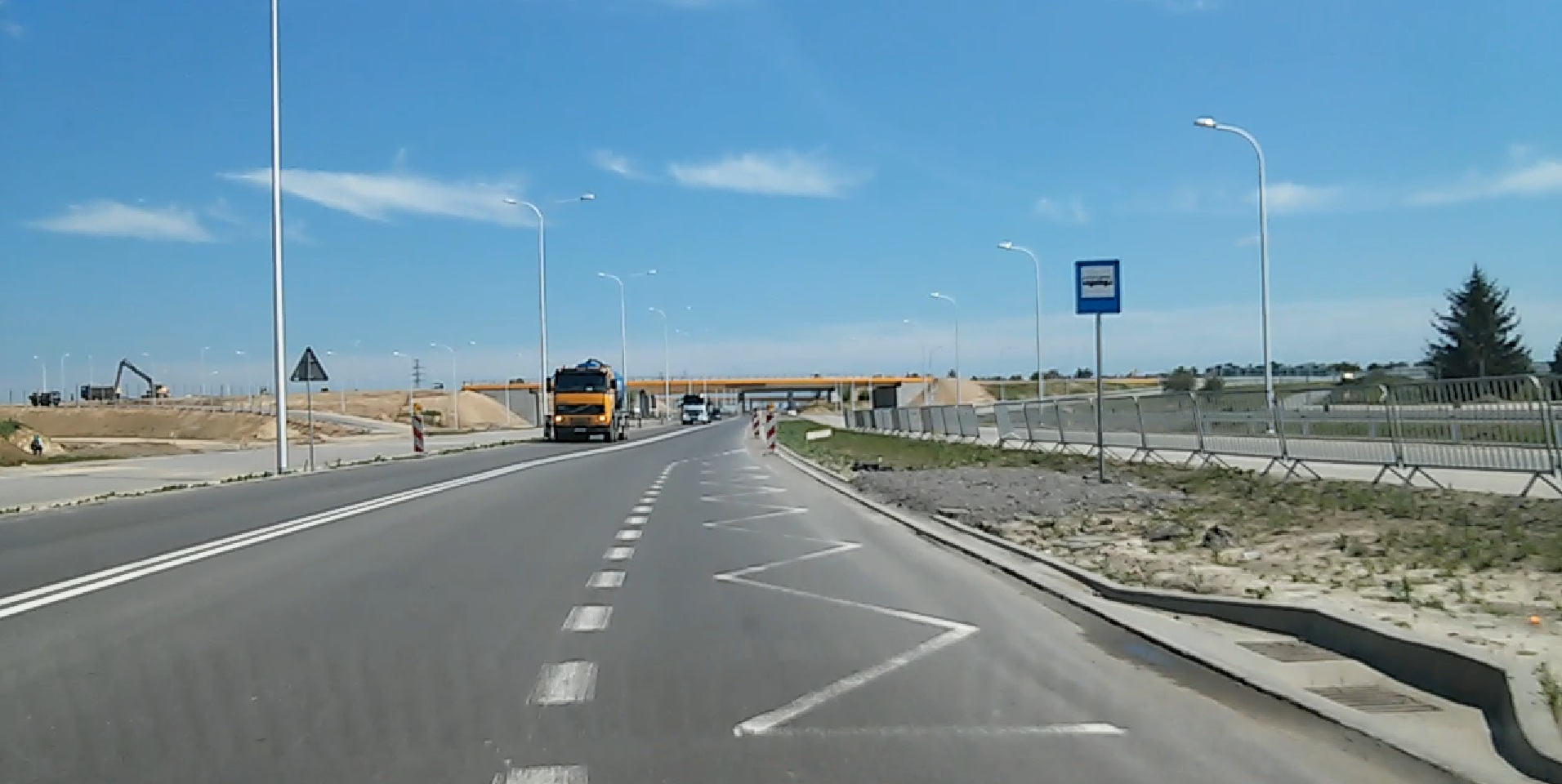 Obwodnica Lublina w trakcie budowy.